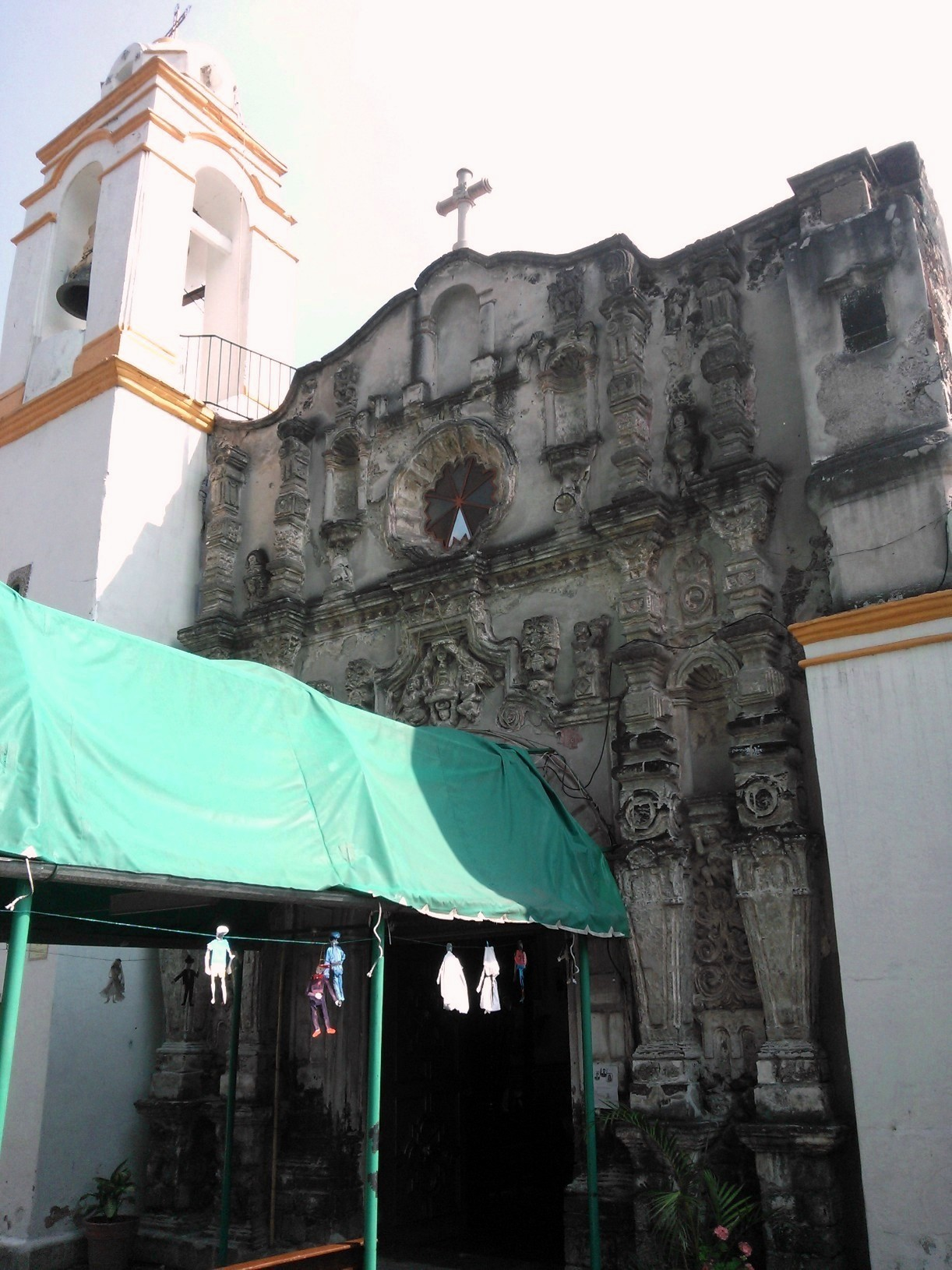 Fachada de santa Anita Zacatlamanco